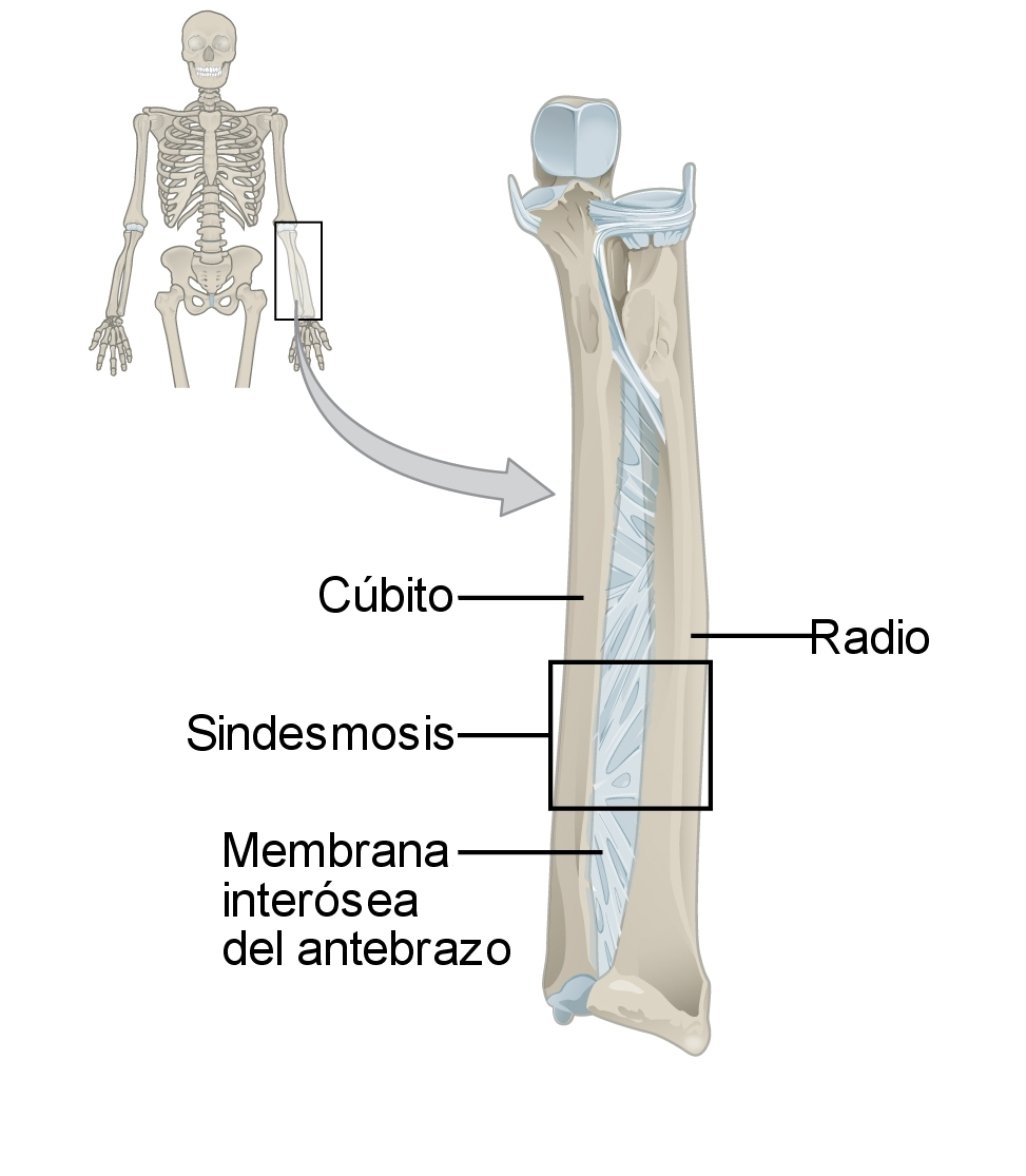 Representación de la membrana interosea que une el cúbito con el radio en el antebrazo. Un ejemplo de sindesmosis.